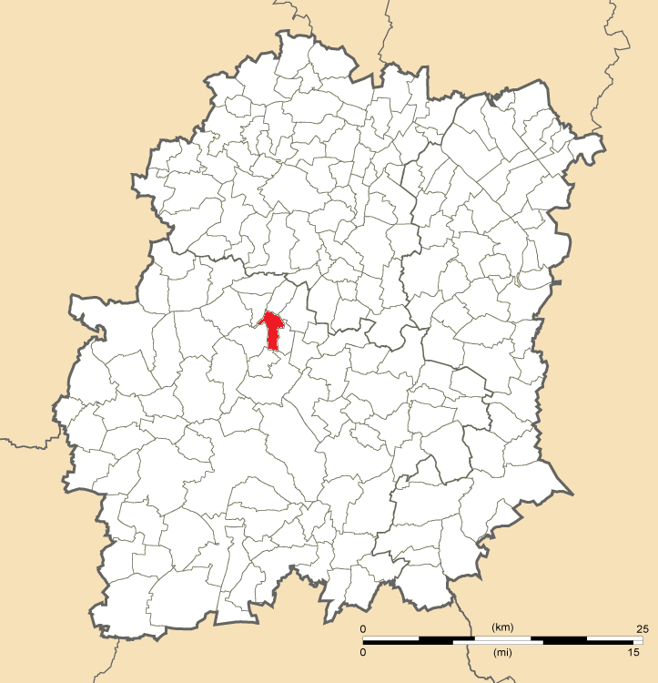 Carte de position de Saint-Sulpice-de-Favières en Essonne (91)